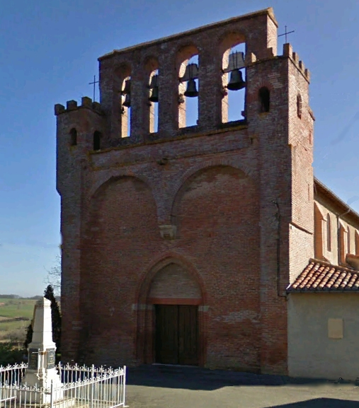 Clocher de l'église .